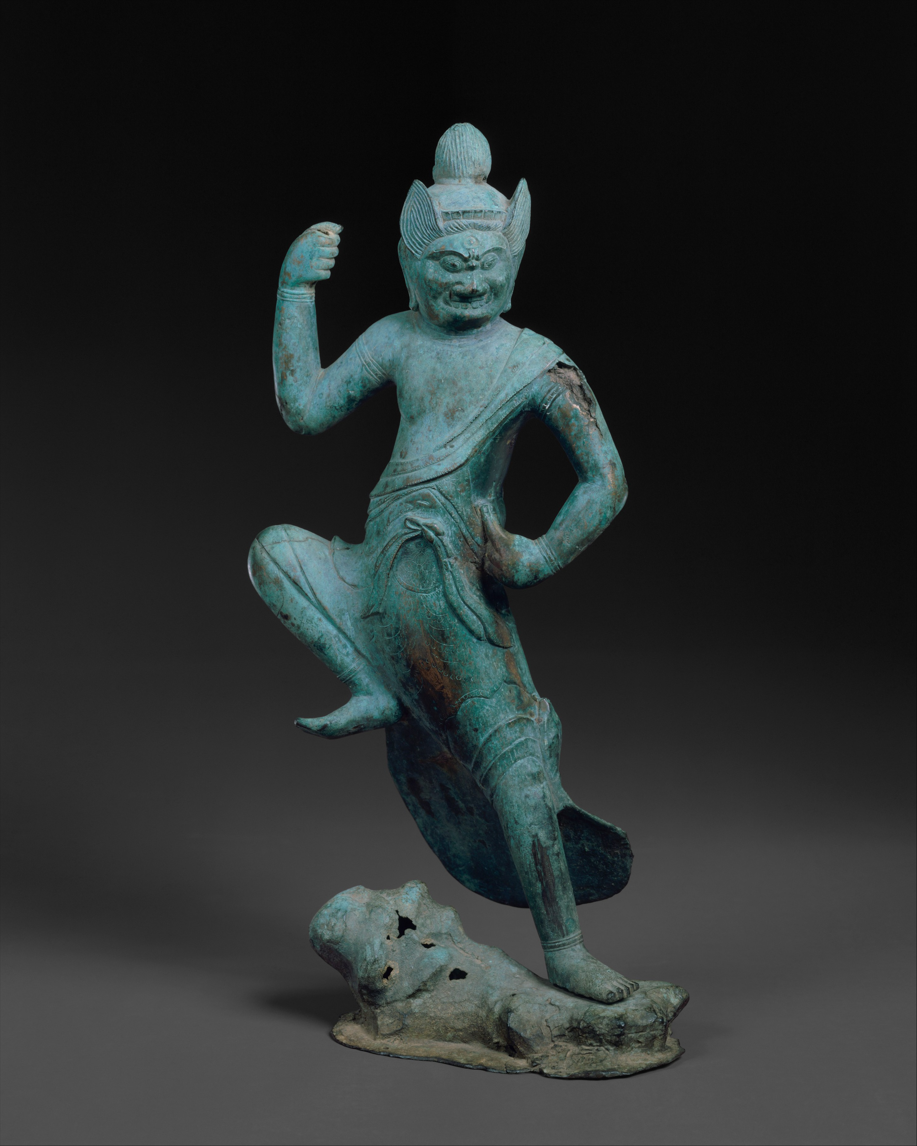 Japan; Figure; Sculpture